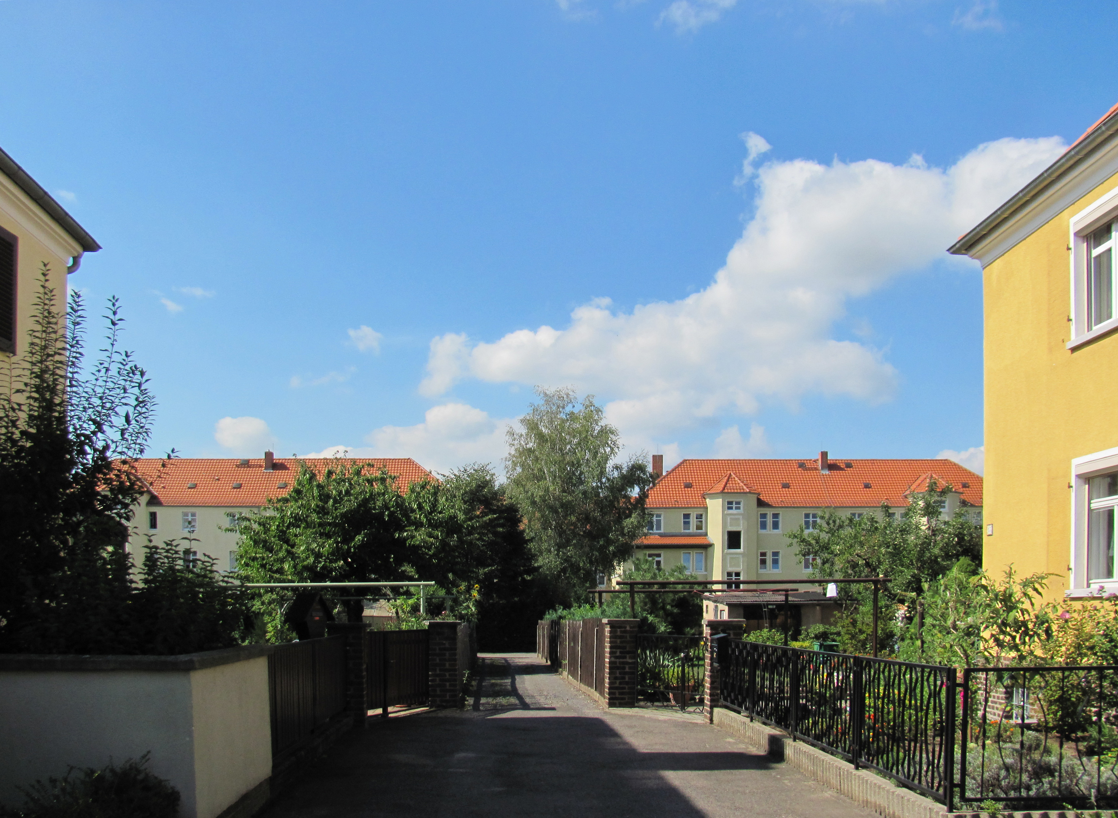 Radebeul (Gemarkung), Damaschkeweg: Westlicher Weg zu den Gärten, Blick zur Rückseite der Seestraßenbebauung